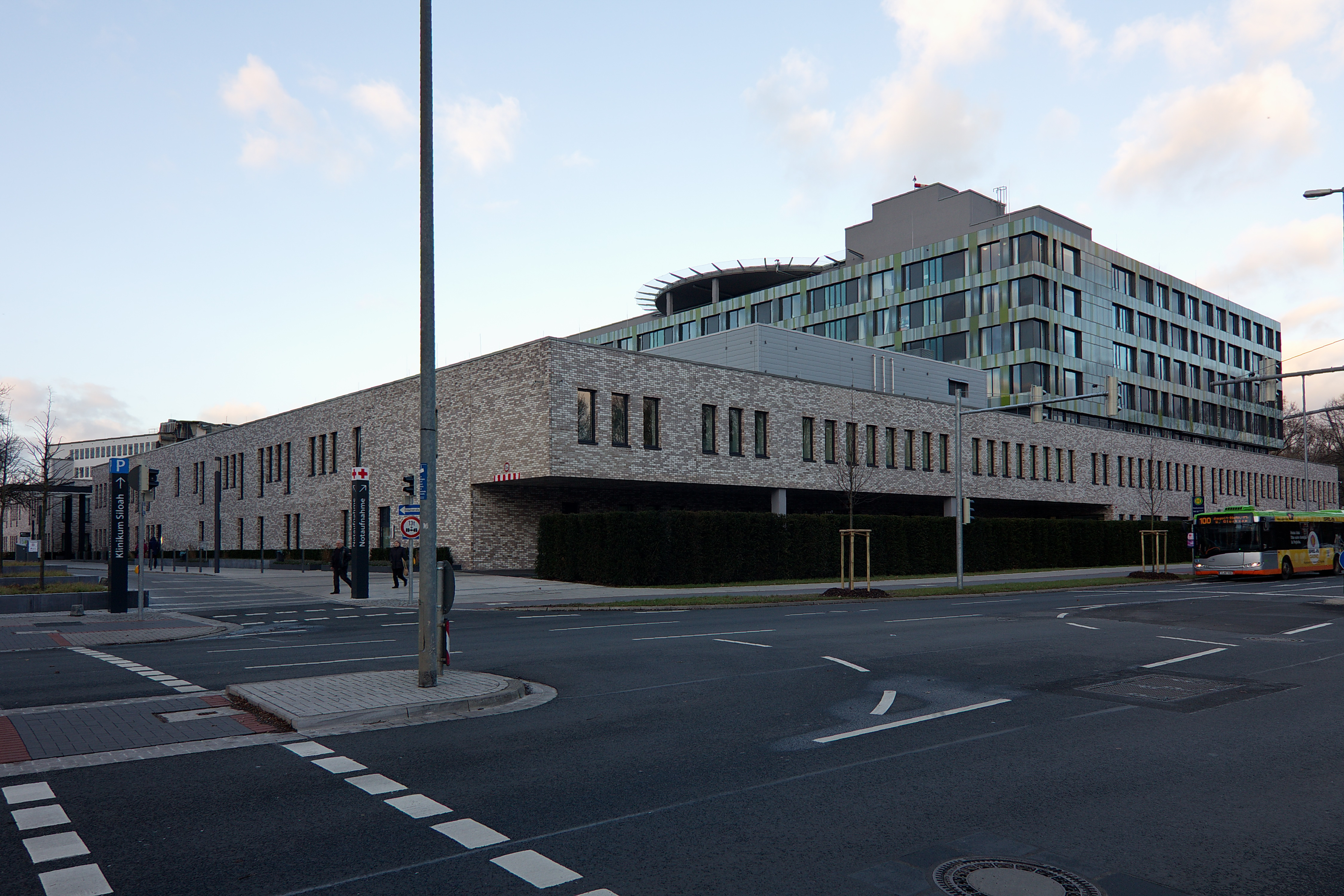 Das KRH Klinikum Siloah-Oststadt-Heidehaus in Linden-Süd (Hannover) ersetzt im Jahr 2014 die bestehenden KRH-Krankenhäuser Siloah und Oststadt-Heidehaus